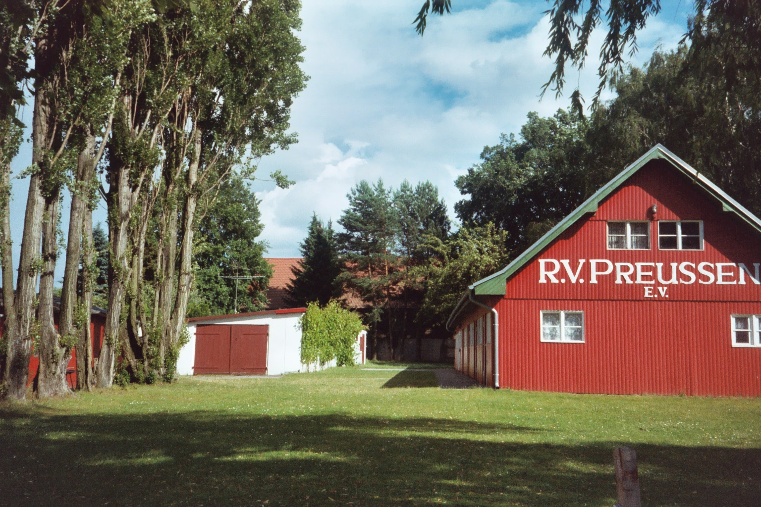 eine der Bootshallen des R.V. "Preußen" e.V. Berlin